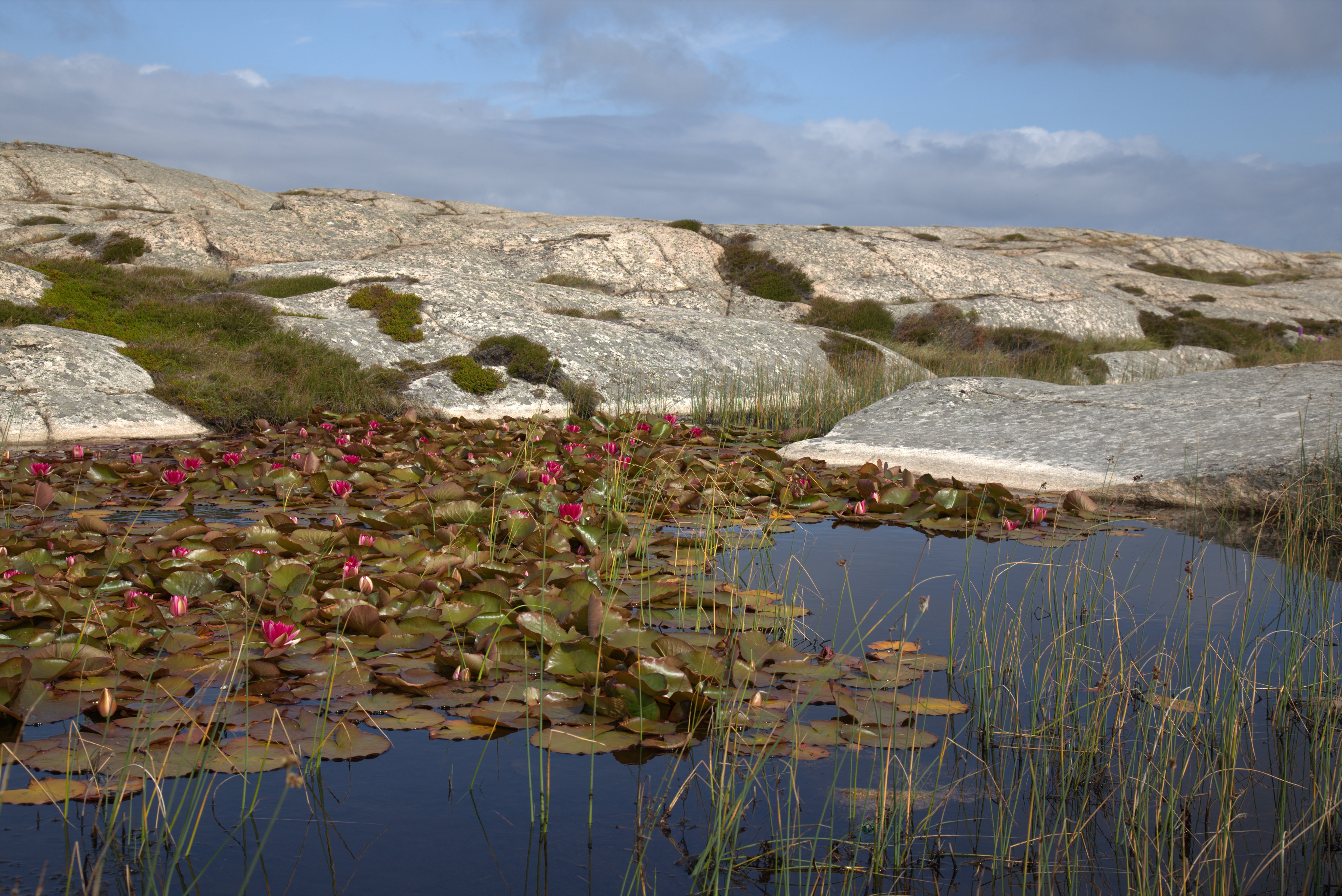 Röda näckrosor i en damm på Sandön på Smögen.